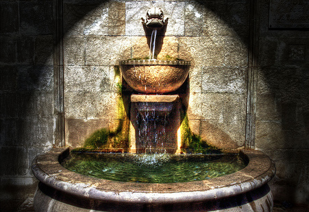 Fuente de la Costa del Jan de Lleida.